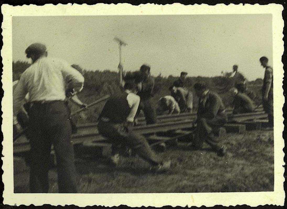 Westerbork, Holland, Construction of railway tracks leading to the camp